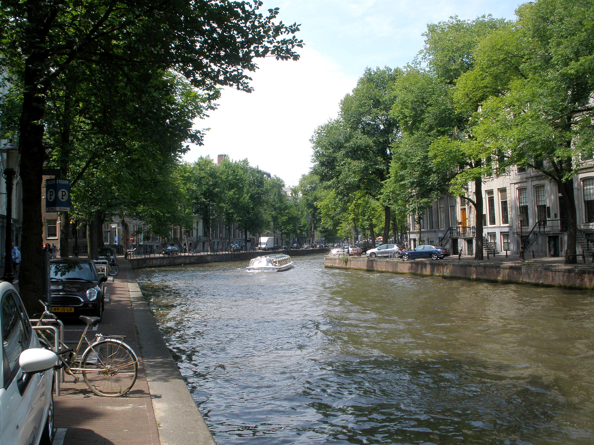 The Gouden Bocht (Golden Bend) in the Herengracht canal in Amsterdam, between Leidestraat and Vijzelstraat.